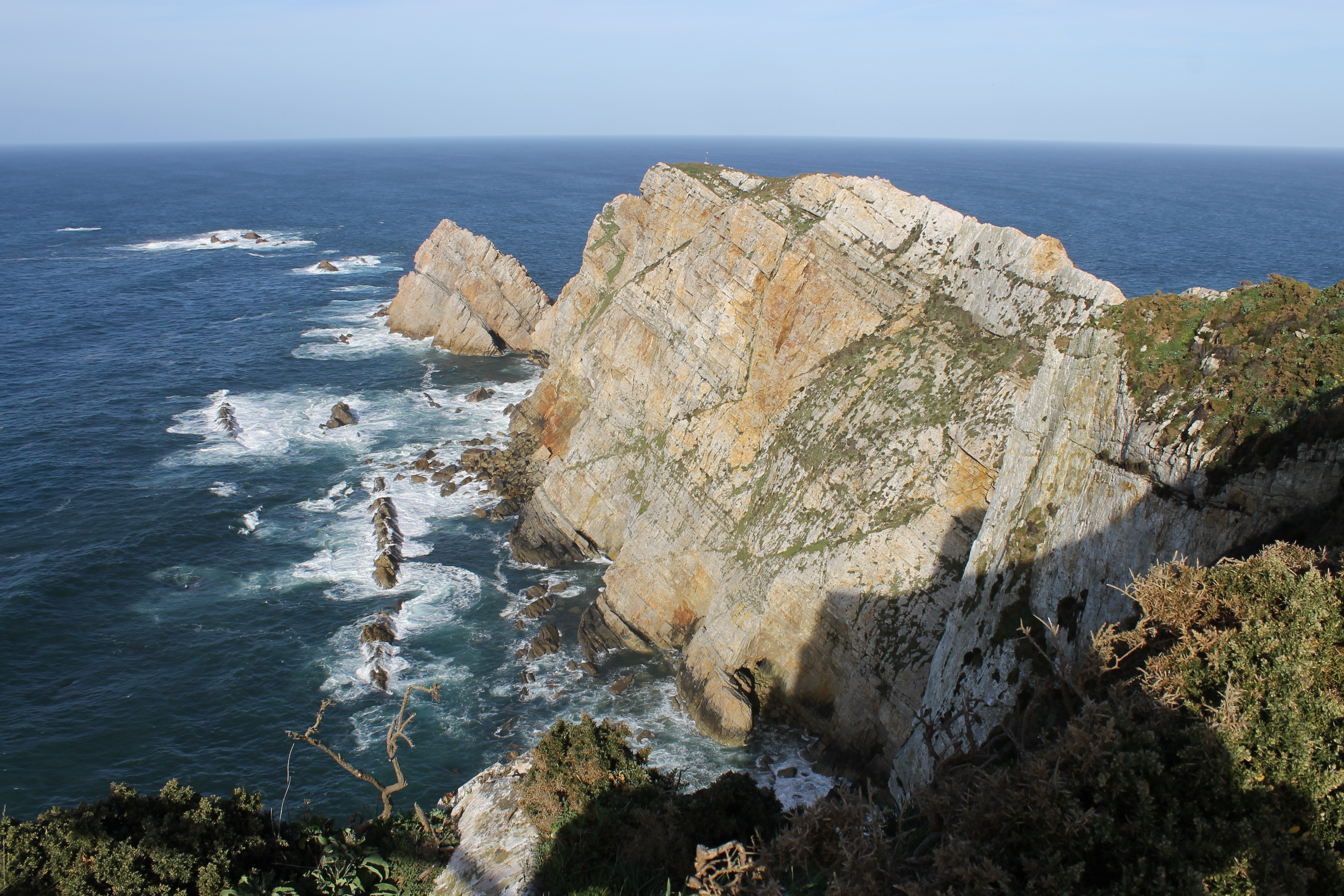 La Gavierona del Cabo Peñas, Luanco (Asturias) This is a photography of a Special Area of Conservation in Spain with the ID: ES1200055. Natura2000 entry, EEA entry